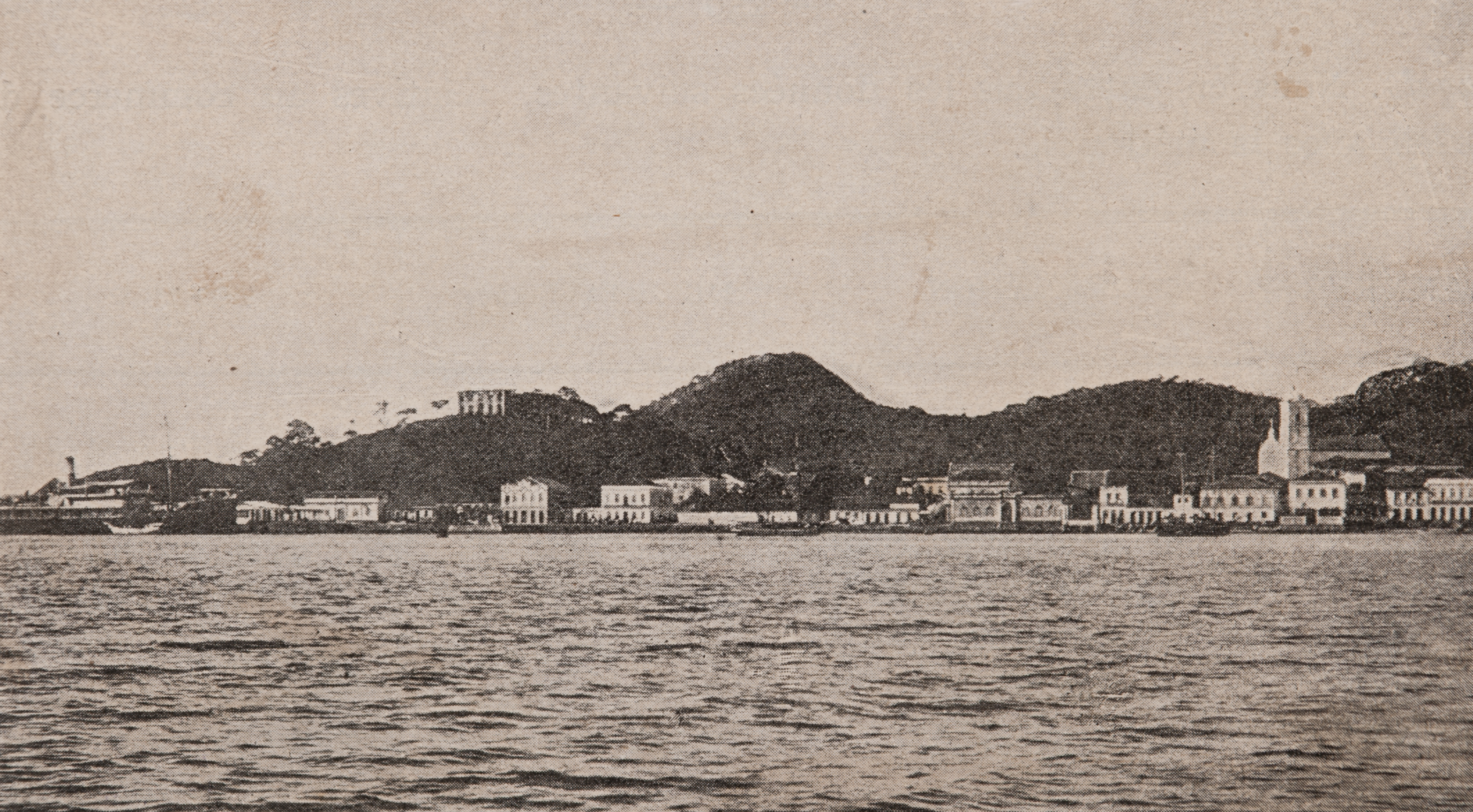 Obra que integra o acervo do Museu Paulista da USP. Coleção João Baptista de Campos Aguirra.